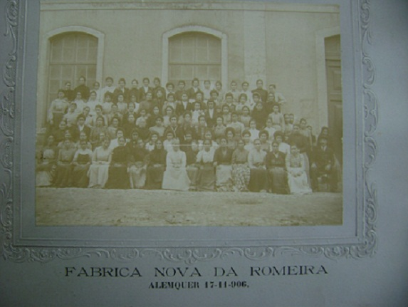 Fábrica Nova da Romeira. Fábrica Nova da Romeira (conjunto de edifícios e instalações da antiga fábrica)